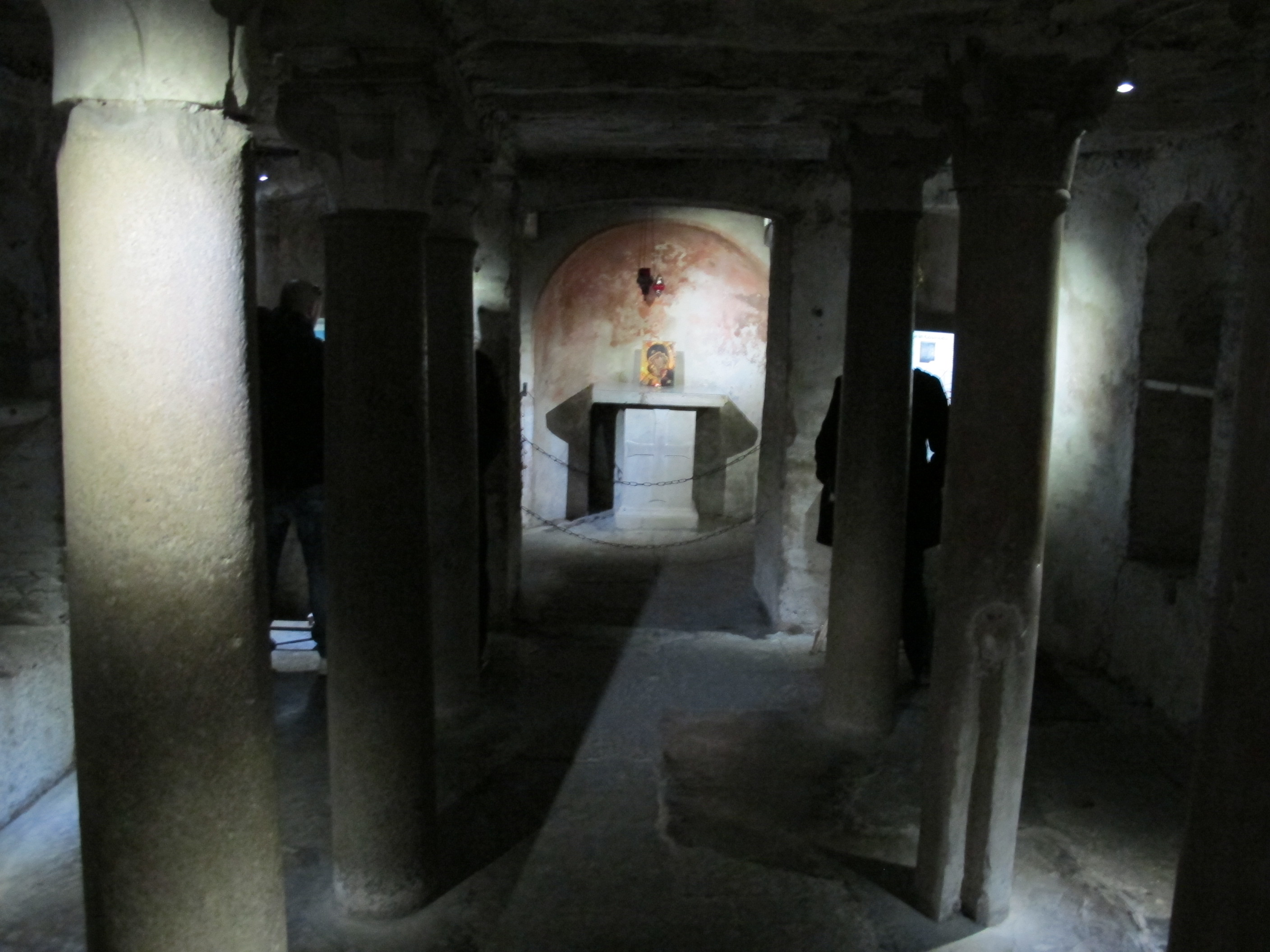 Colonnes antiques et cryptes de Santa Maria in Cosmedin (Rome, Latium, Italie).